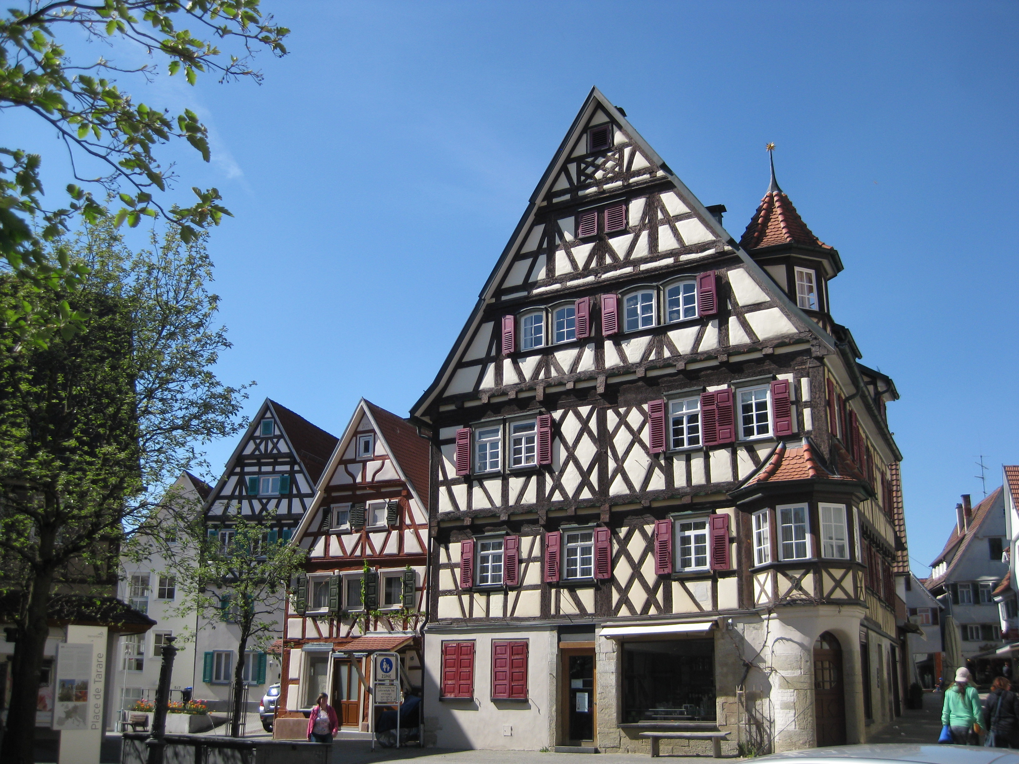 Herrenberg: Spitalgasse Ecke Schulstr.8, Place de Tarare